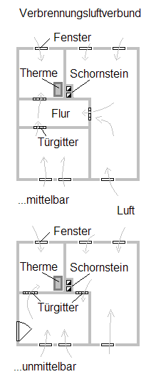 Verbrennungslufverbund